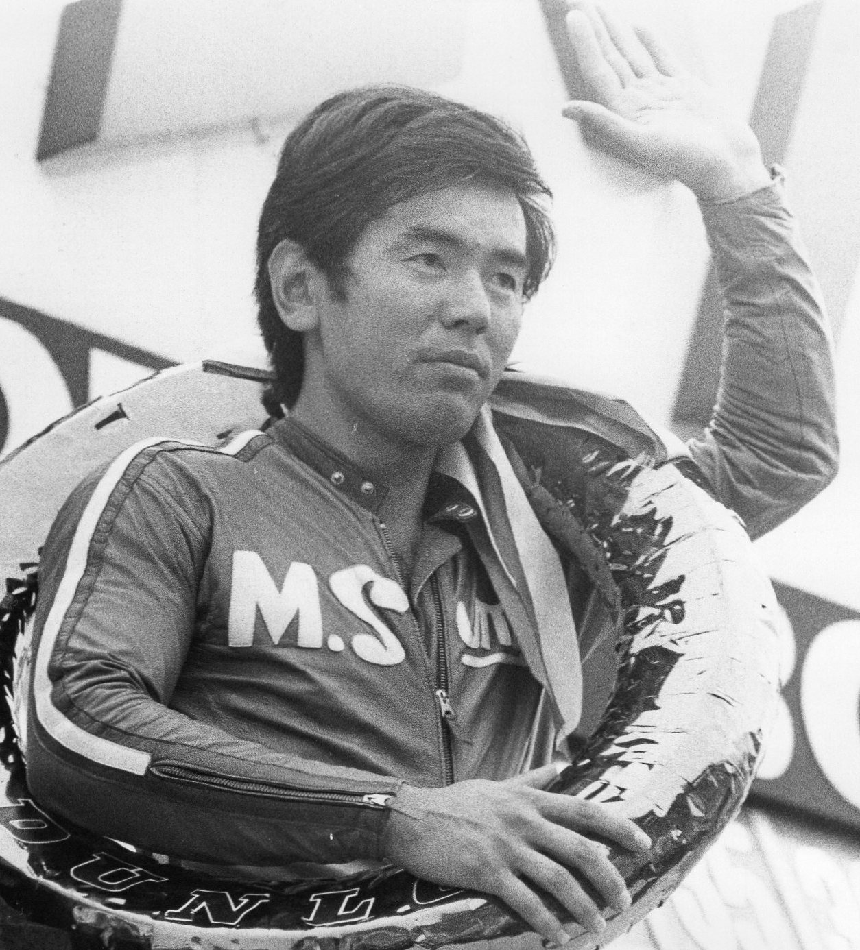 1972 Suzuka / All Japan Road Race Championship